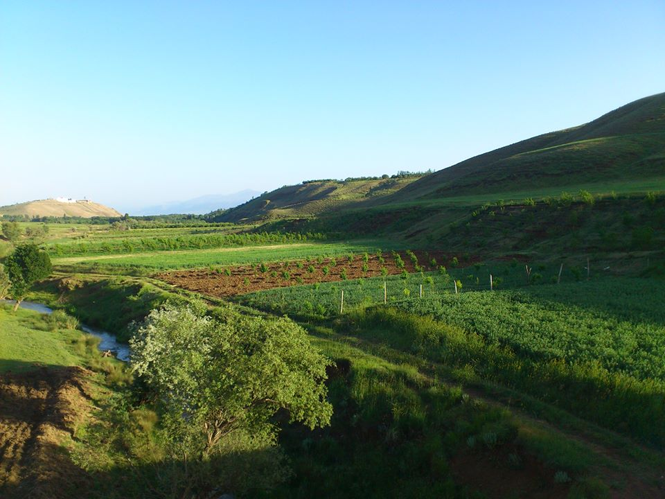 از بالای پل عکس رو گرفتم